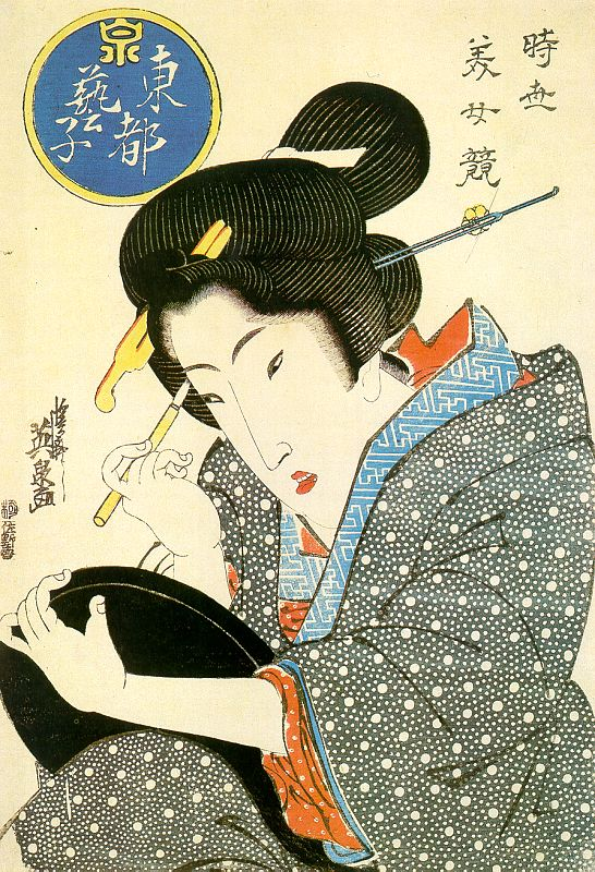 Bijin (beautiful woman) ukiyo-e by Keisai Eisen